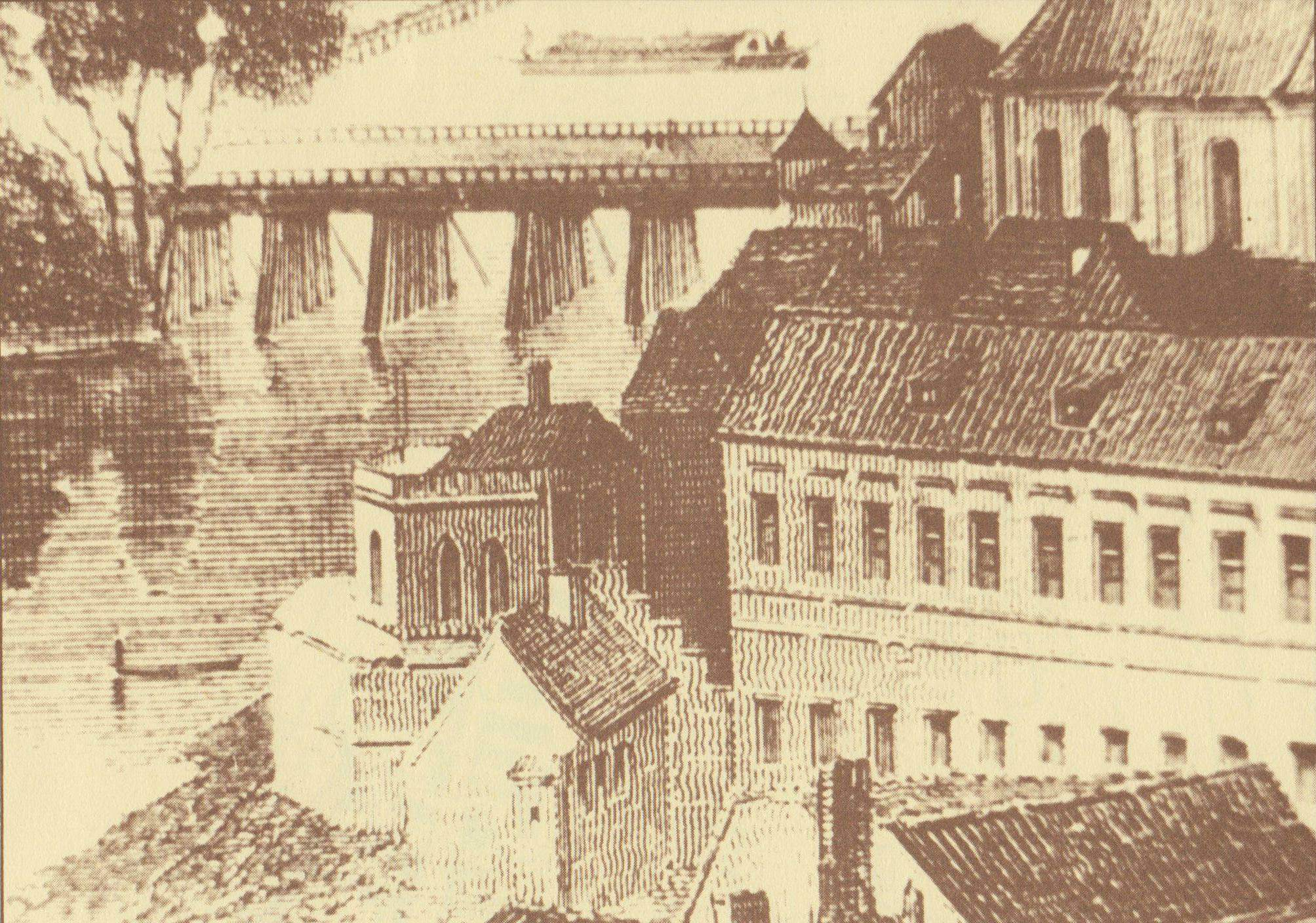 Az Esztergom-vízivárosi Mattyasovszky-bástya és környéke, 1860 körül